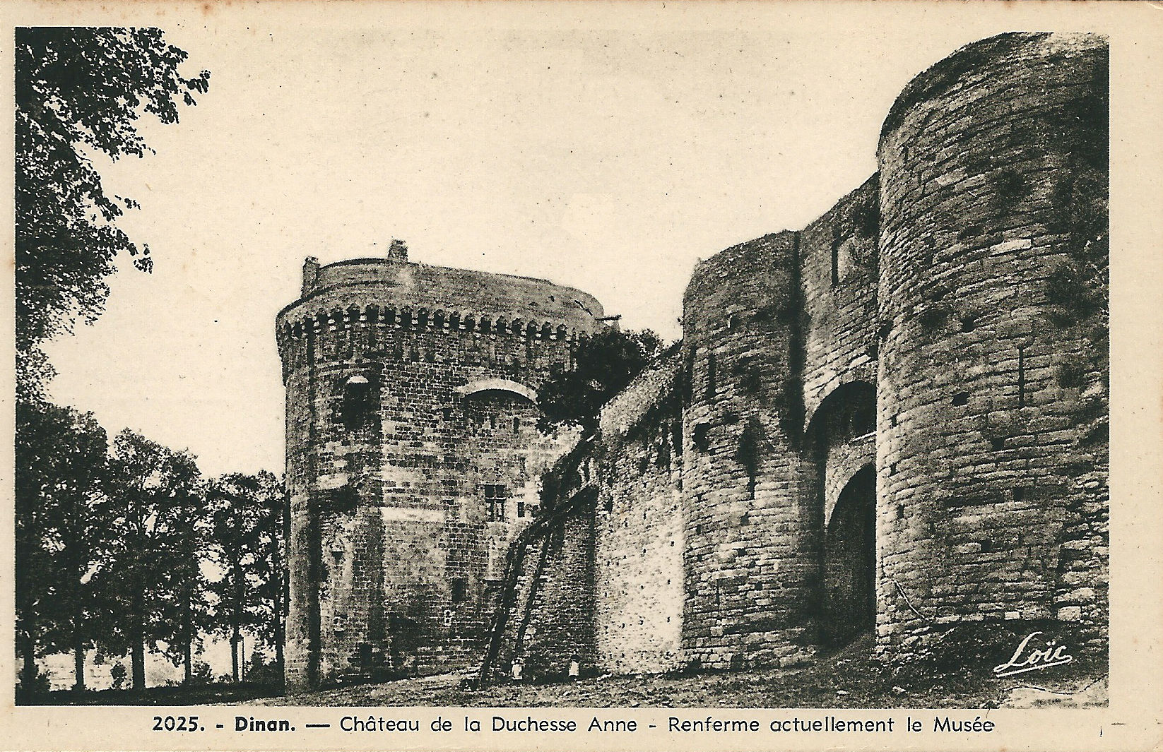 Dinan (Côte du Nord , France) ; carte postale